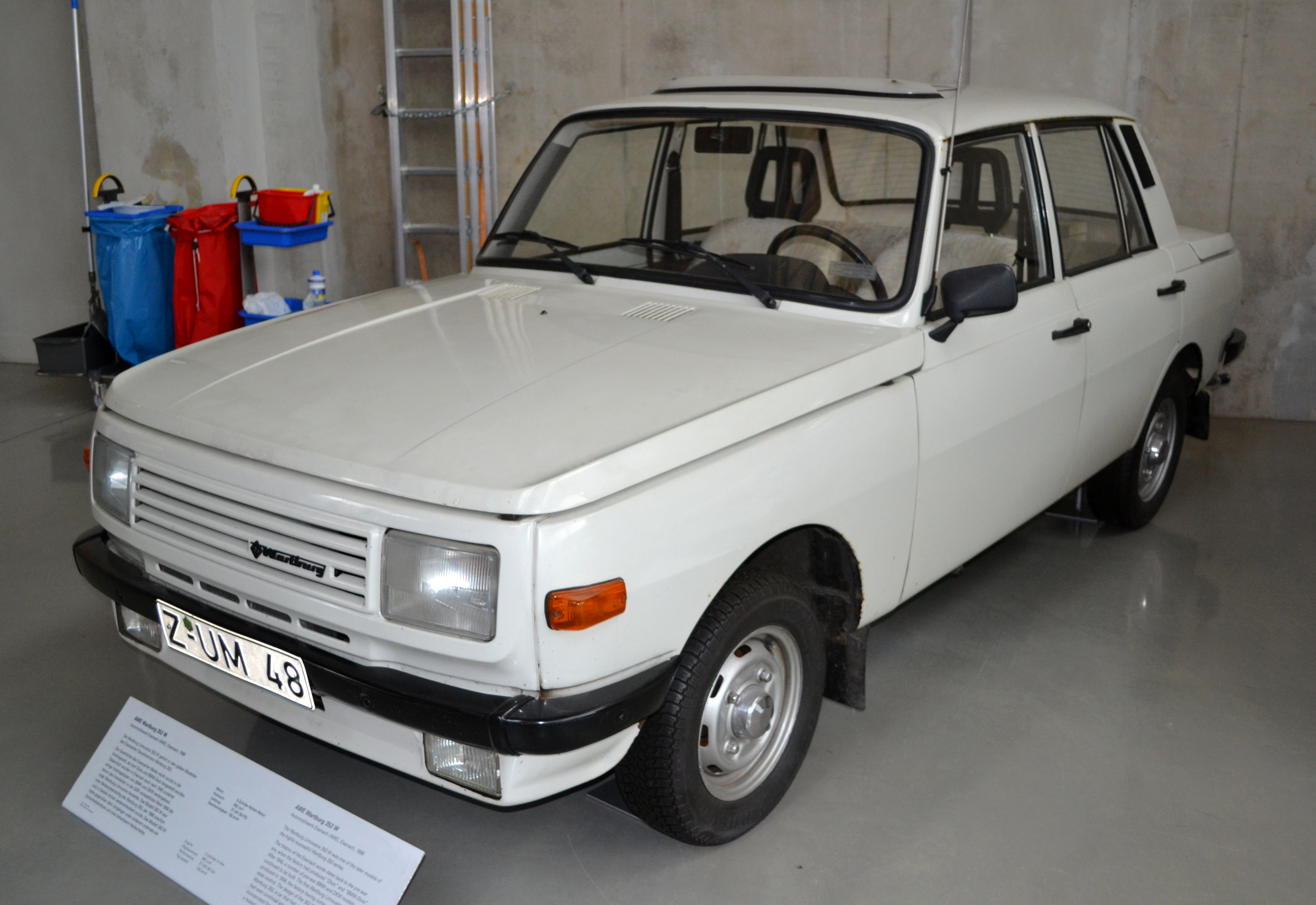 Der Wartburg 353W der DDR im Verkehrszentrum des Deutschen Museums - Halle I.